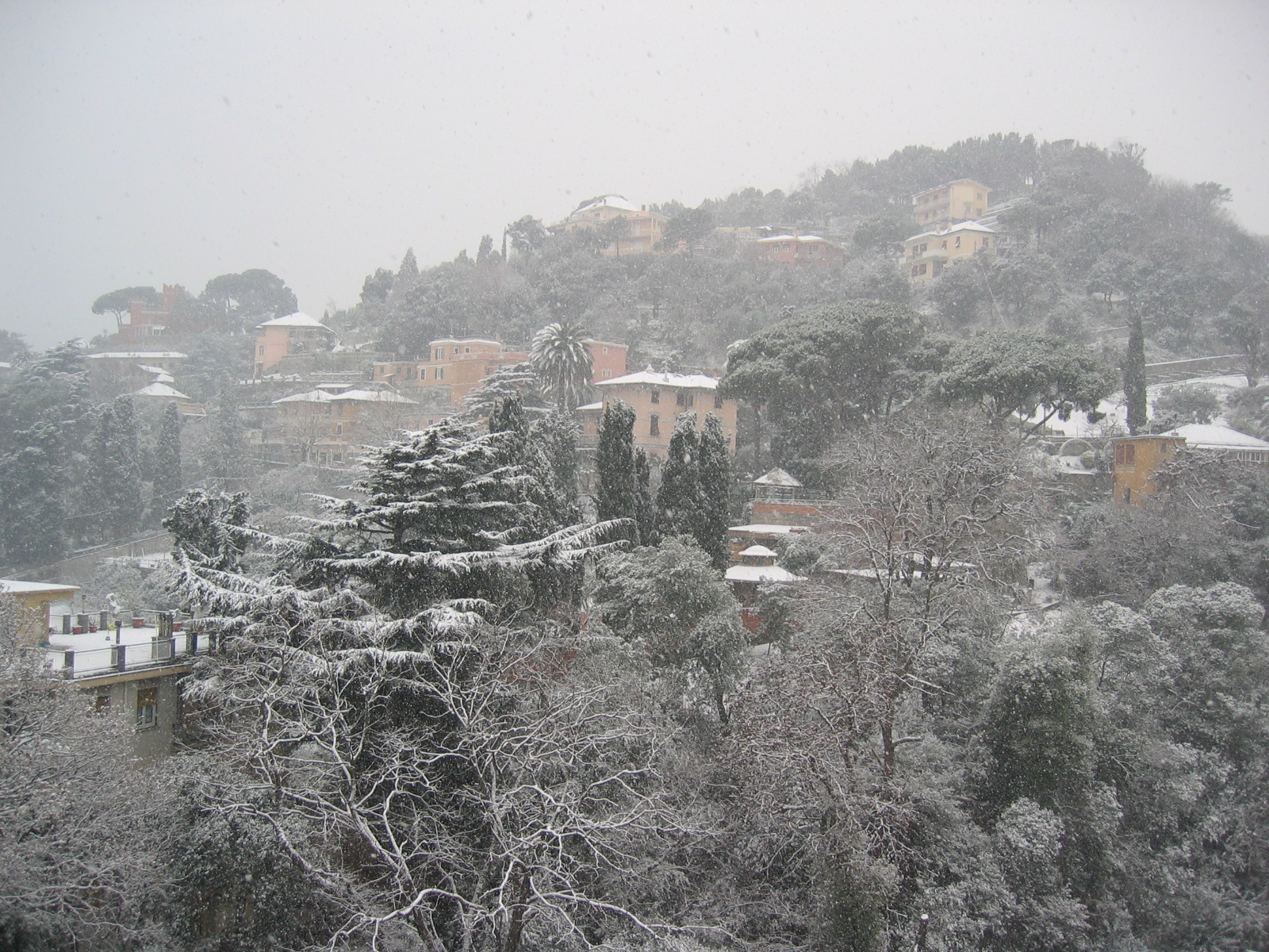 Veduta generale della "collina" di Viale Modugno con le ville un tempo residenza delle famiglie degli imprenditori pegliesi